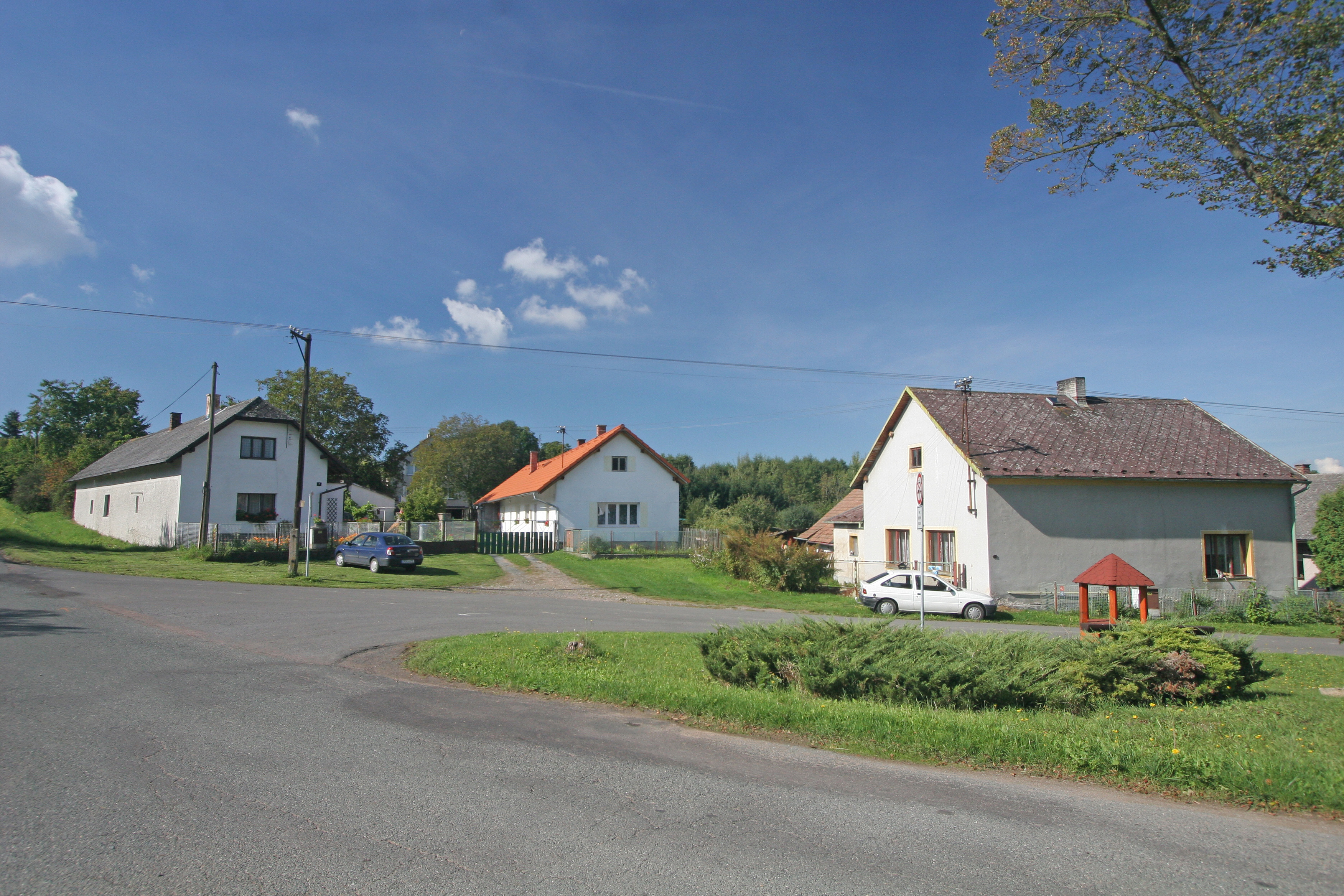 Vyžice čp. 43